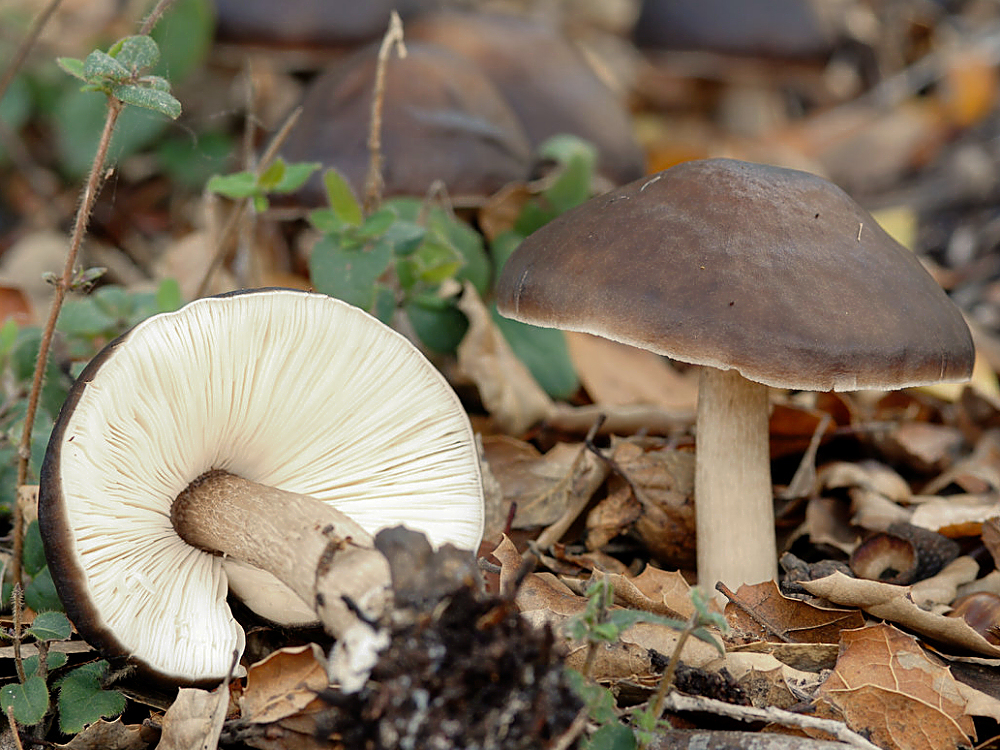 Pluteus cervinus (Schaeff.) P. Kumm.